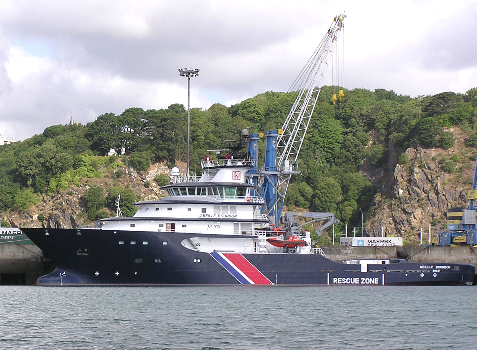 Objet : Remorqueur de Haute Mer Abeille Bourbon à quai au port de Brest Date : Aout 2005 Auteur : Pline Source : Photo personnelle